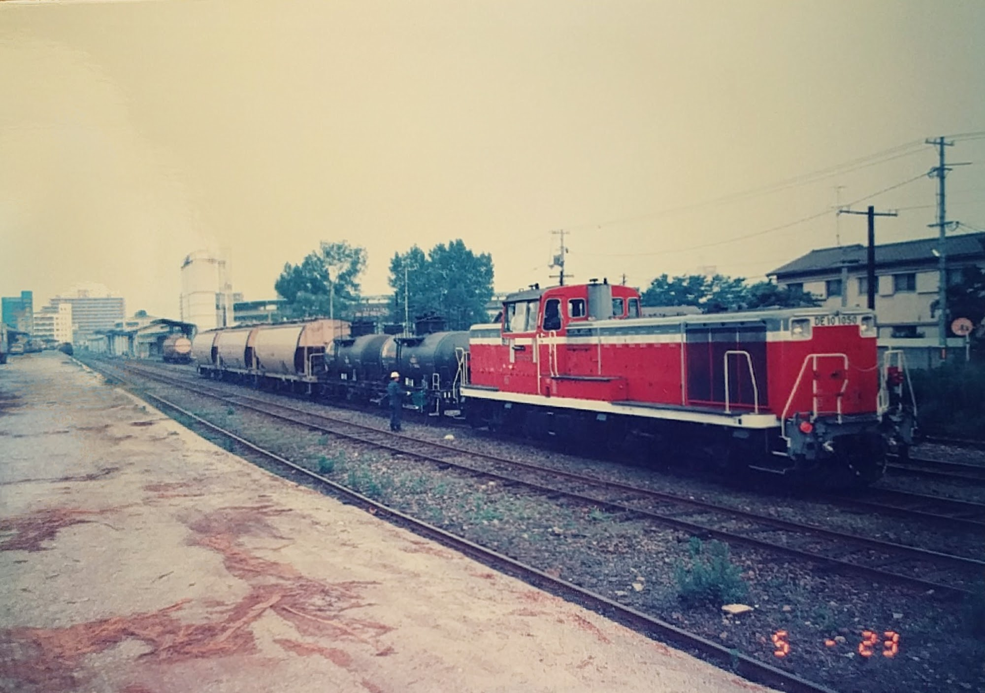 旧宇品駅行き下り貨物列車が宇品駅に到着した後、機関車を上り貨物に付け替えているところ。1986年6月11日午前5時23分。